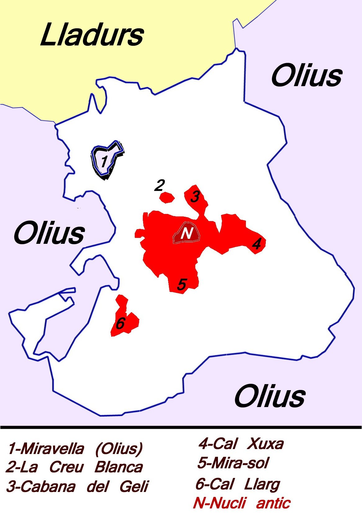 Mapa del term municipal de Solsona amb els municipis limítrofes i els principals barris.